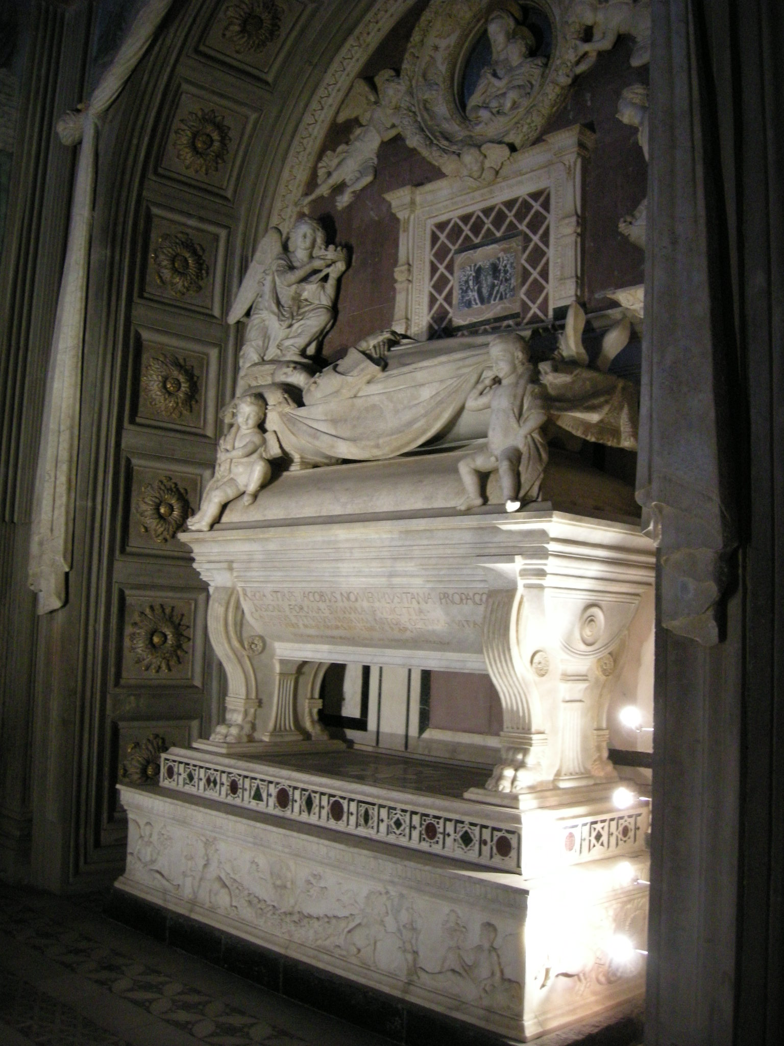 Cappella del cardinale di portogallo 03 tomba del cardinale di antonio e barnardo rossellino 02